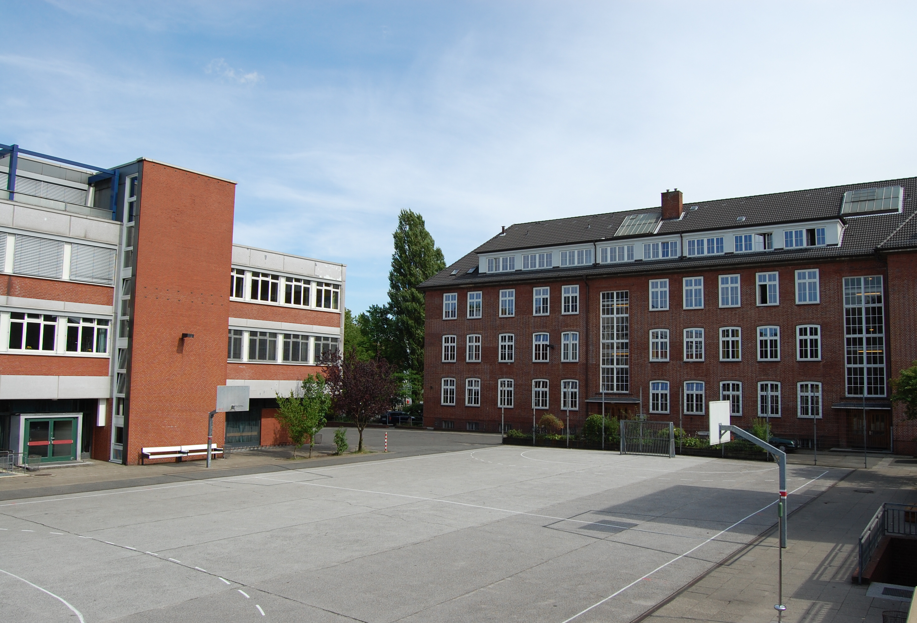 Sankt Ansgar Schule in Hamburg